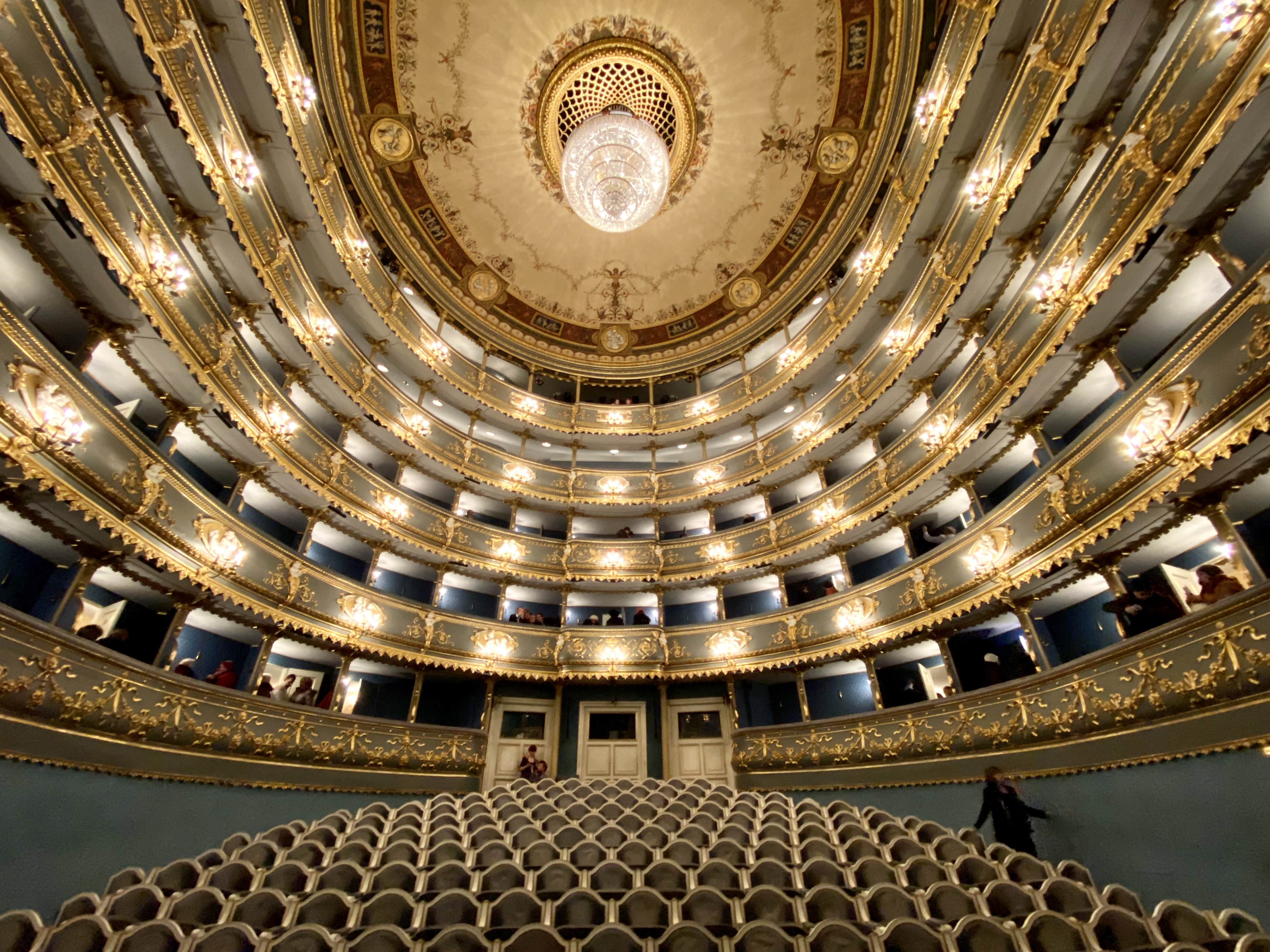 Praga - Teatre dels Estats - Interior